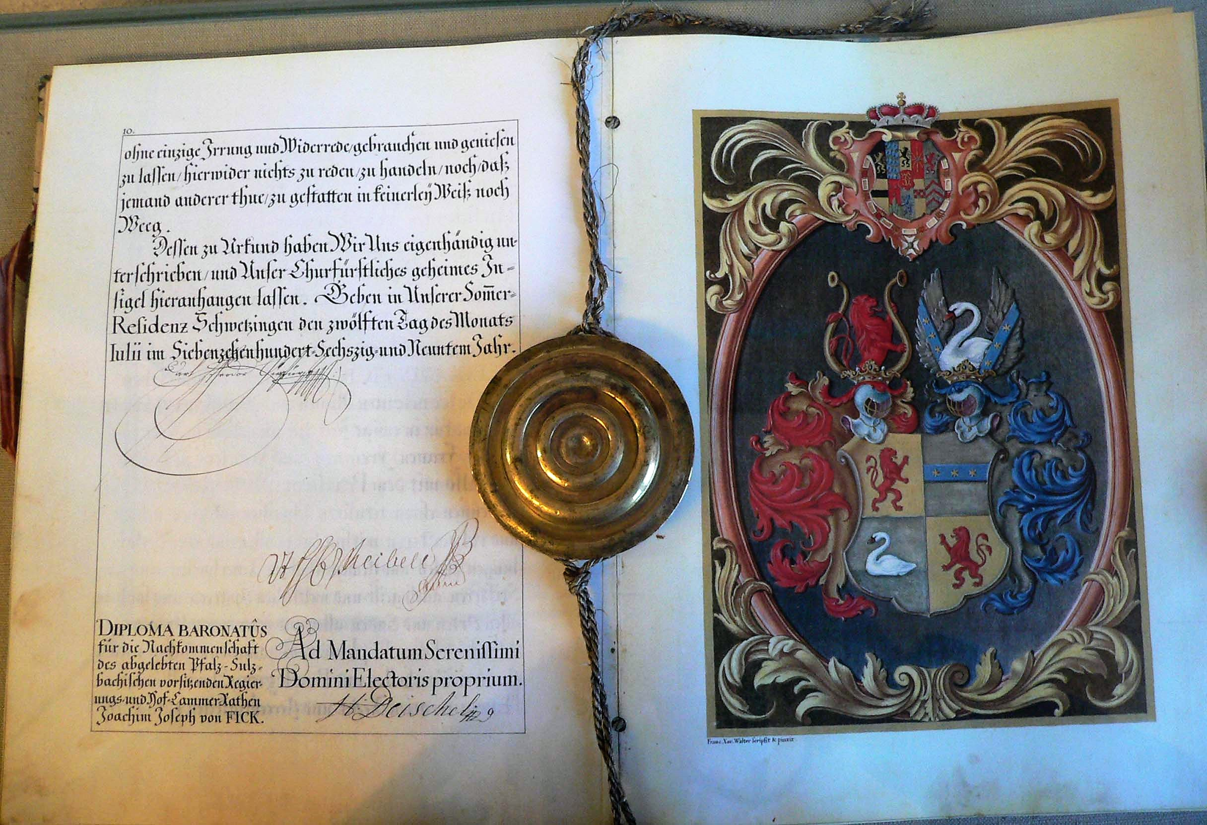 Wappenbrief der Freierren von Fick zu Angeltürn (1769) ausgestellt im Heimatmuseum des Heimatvereins Boxberg